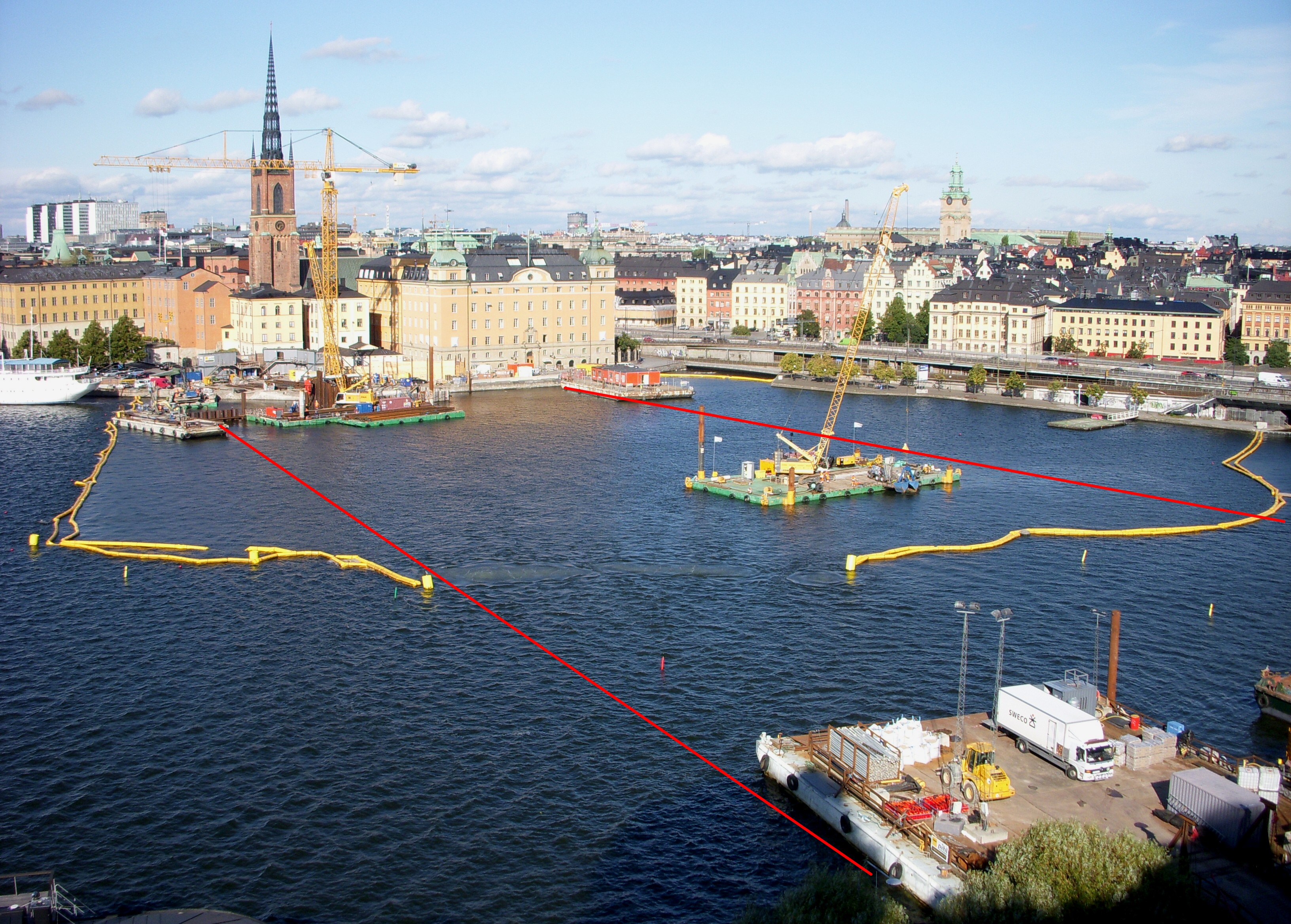 Citybanan, arbetsområdet vid Söderström 2009-09-21 (mellan de röda linjerna)